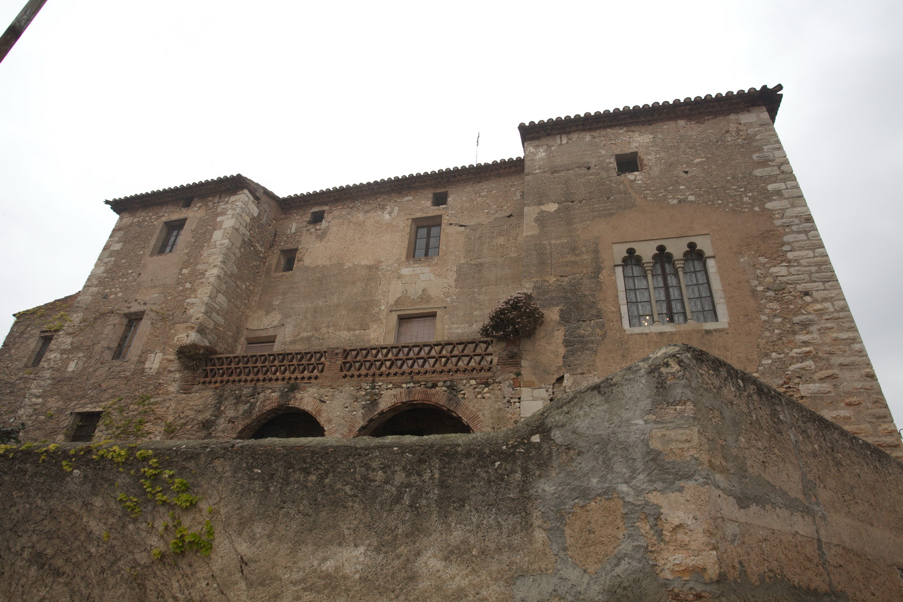 Casal dels Marquesos de Vallgornera (el Rourell)